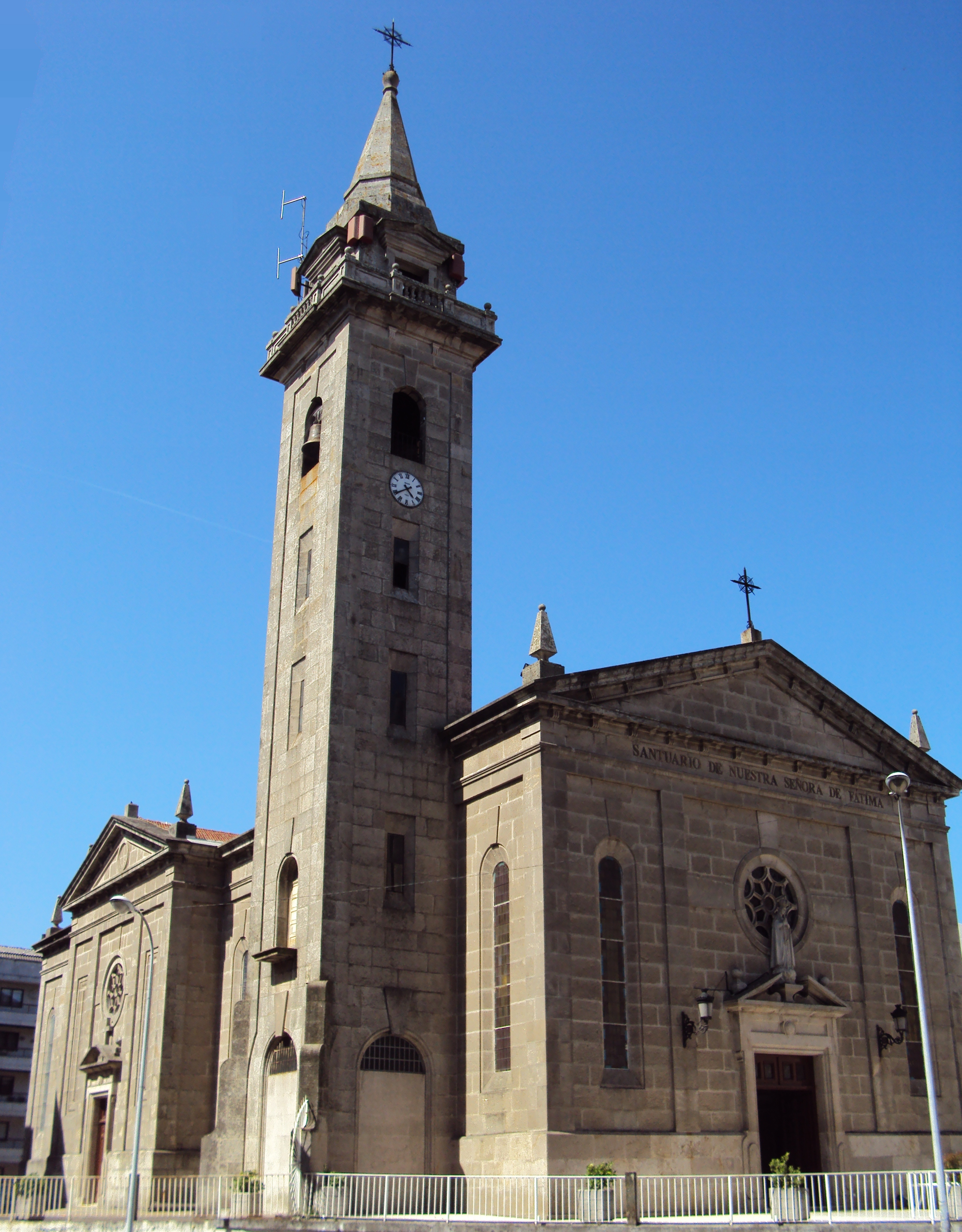 Igrexa de Fátima, Vigo (arquitecto Antonio Cominges Tapia, 1959)